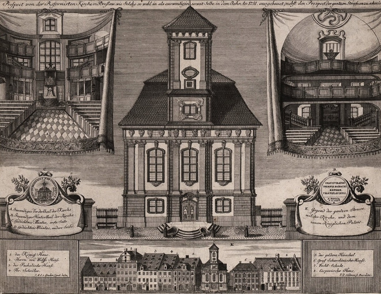 Kościół Opatrzności Bożej we Wrocałwiu na rycinie Johanna Davida Schleuena z 1740-1750